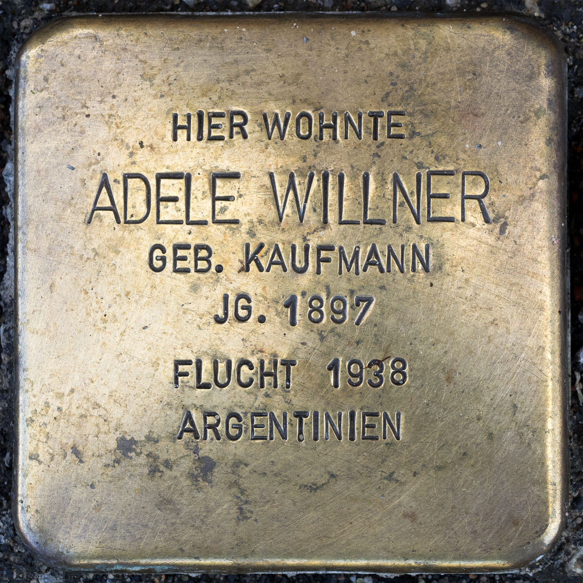 2016 Stolpersteine ToeVo Willner Adele